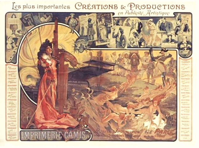 Les plus importantes créations & productions en publicité artistique. Les plus grandes machines du monde. Imprimerie Camis, quai de Jemmapes, 172, Paris...